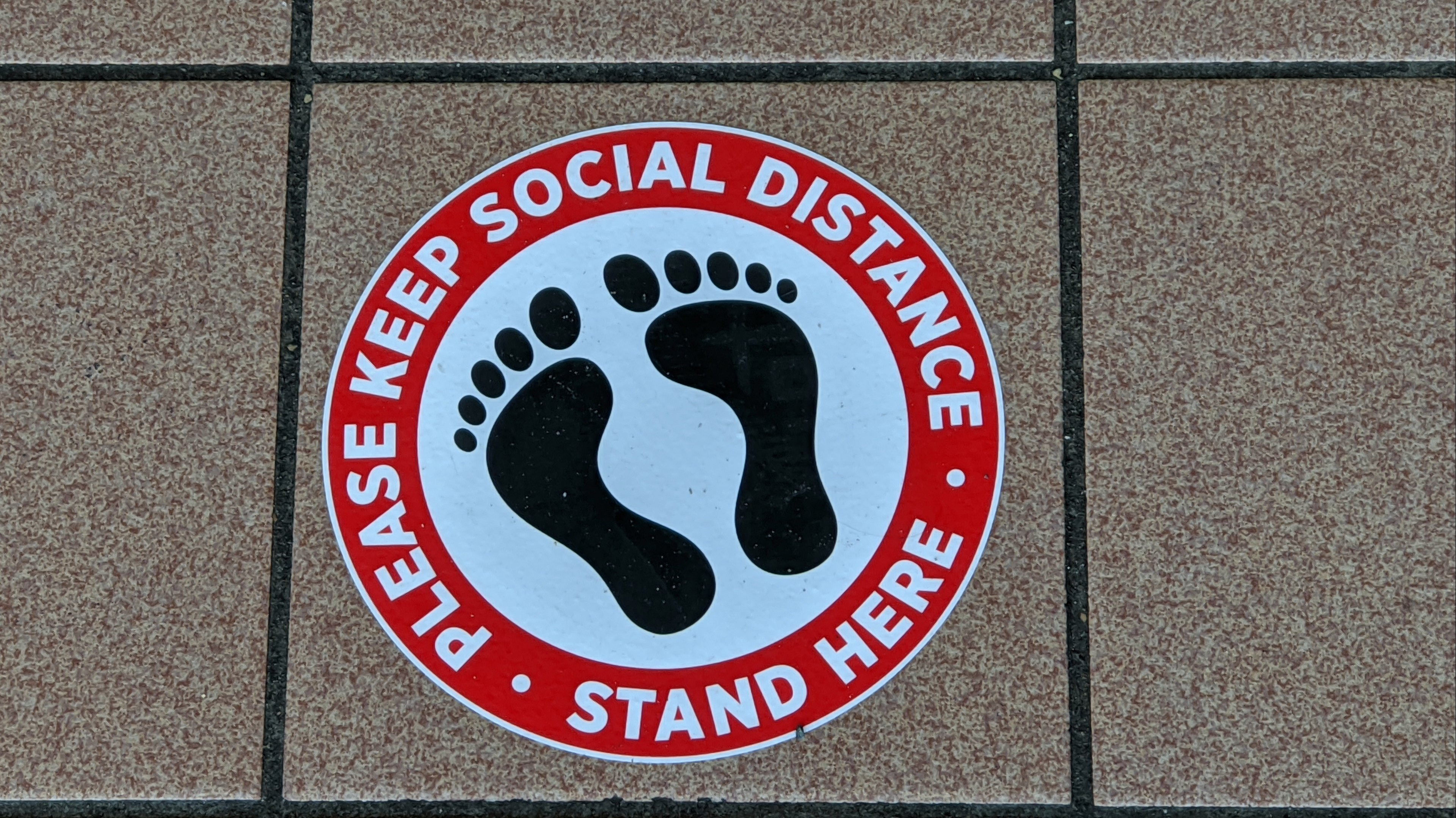 Social distance feet